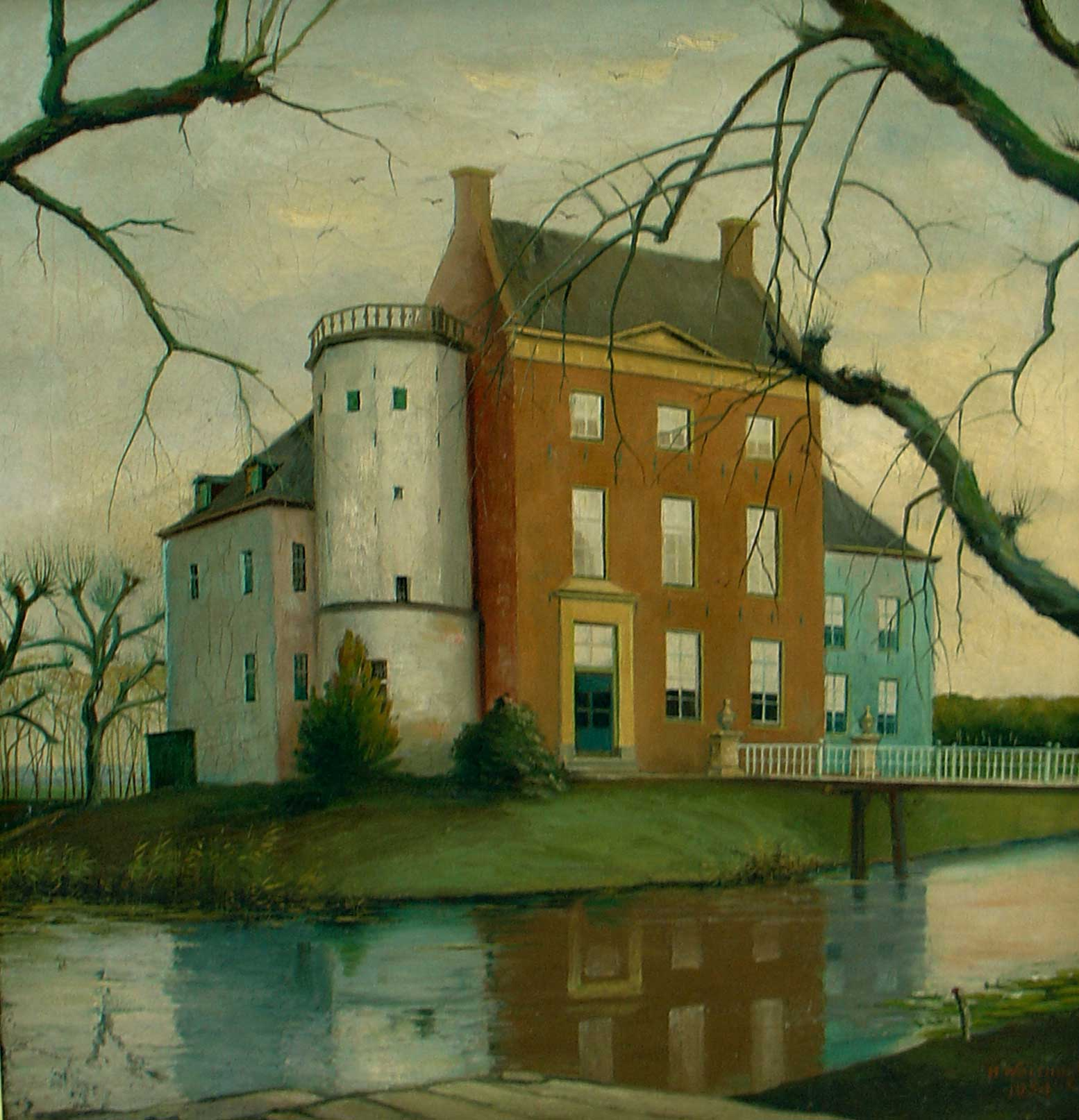 afbeelding van een schilderij van de voormalige borg Dijksterhuis bij Pieterburen